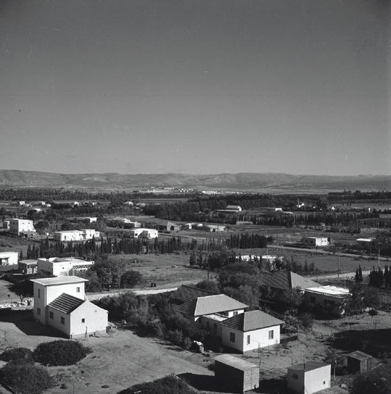 נהריה - מראה